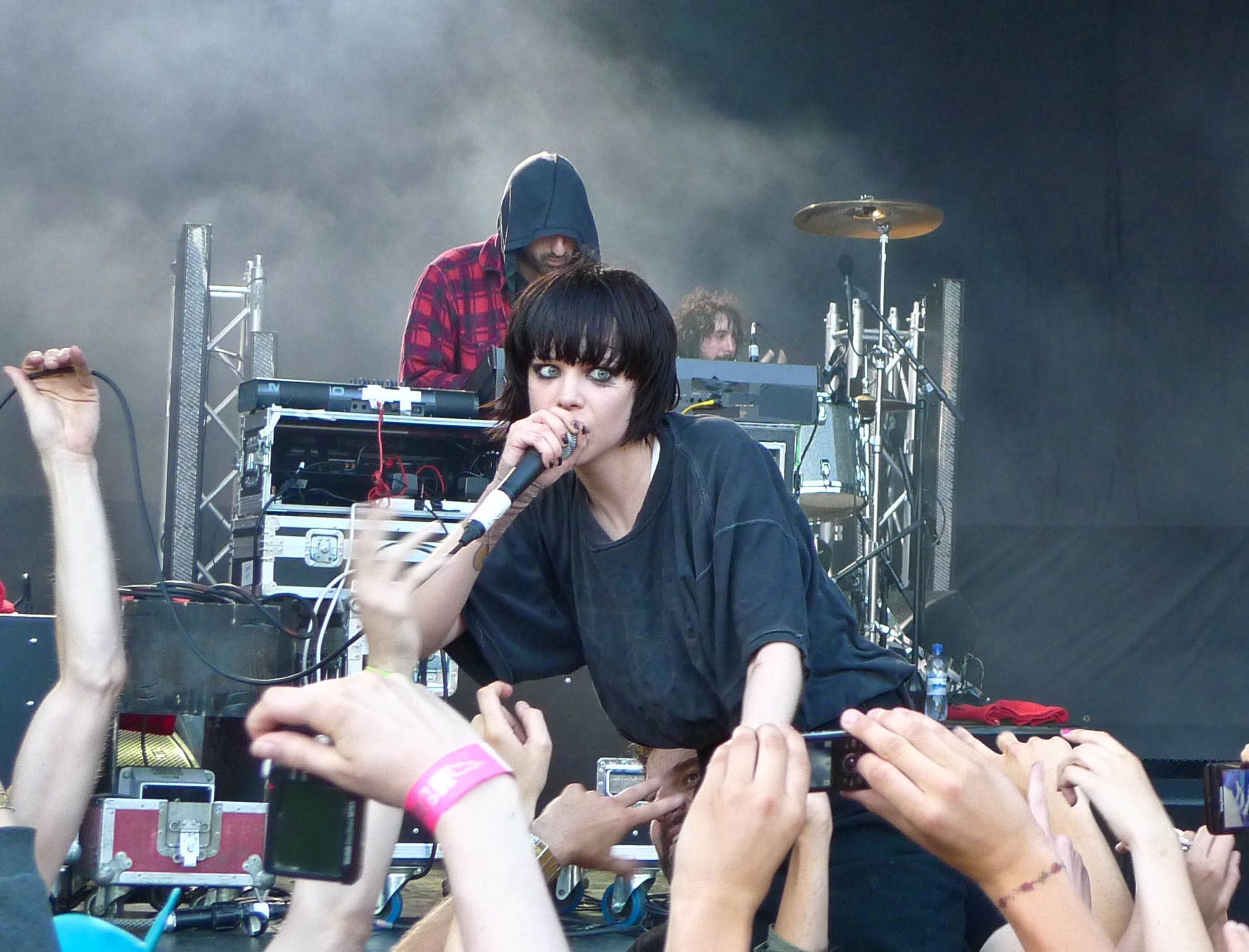 L1020329.jpg